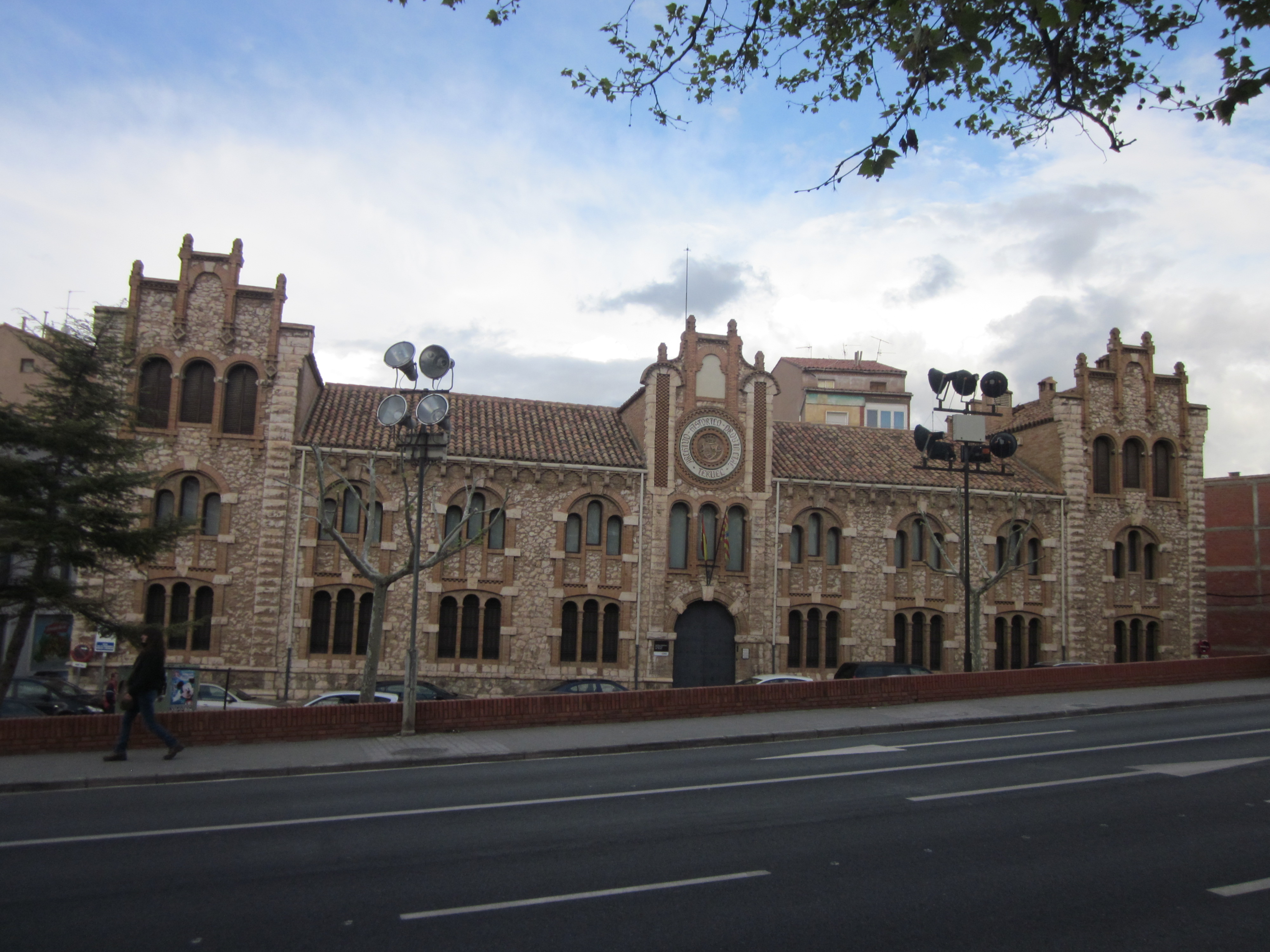 Archivo Histórico Provincial de Teruel. Aragón, España.